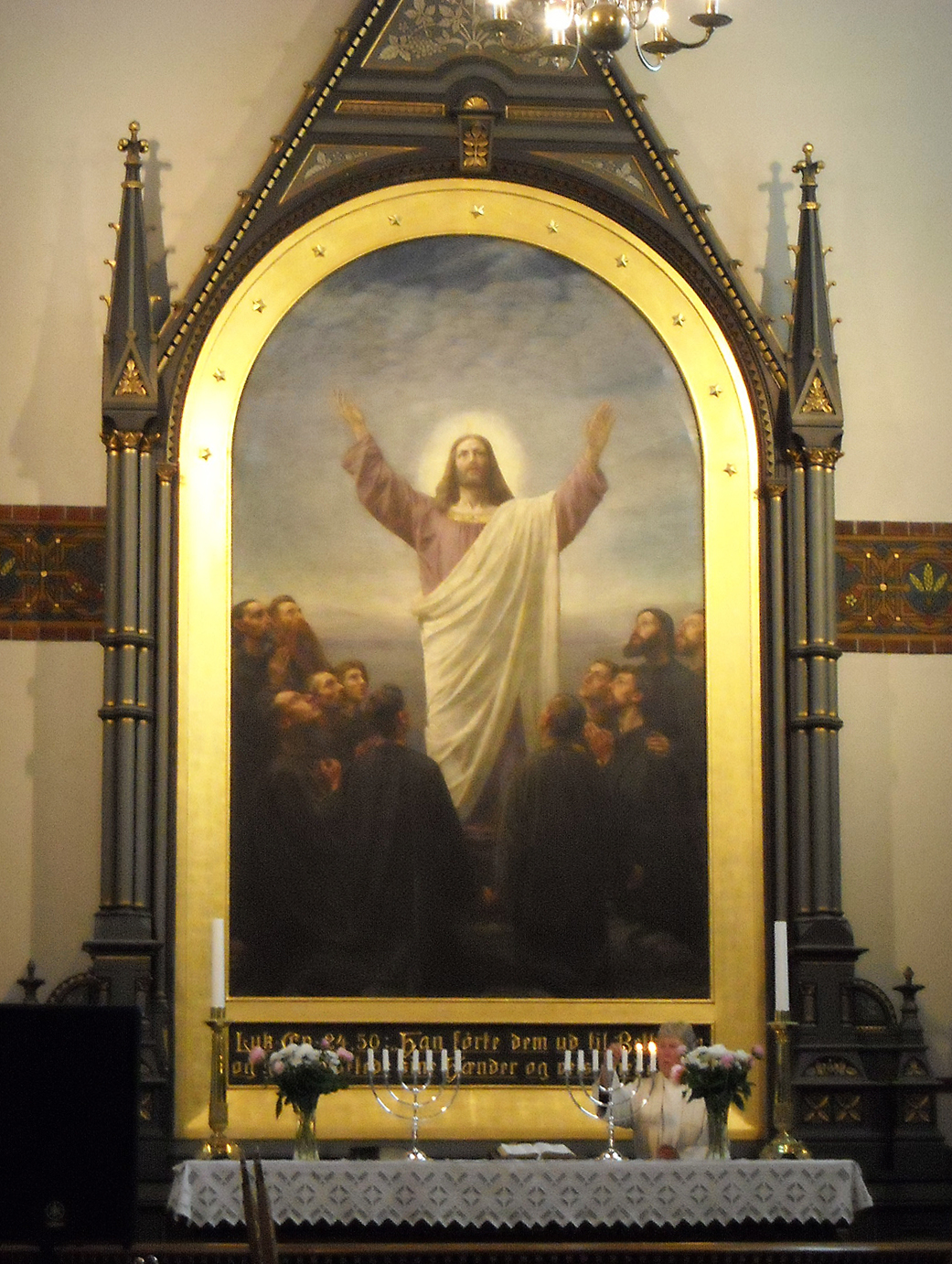 Altertavlen i Trefoldighetskirken i Arendal